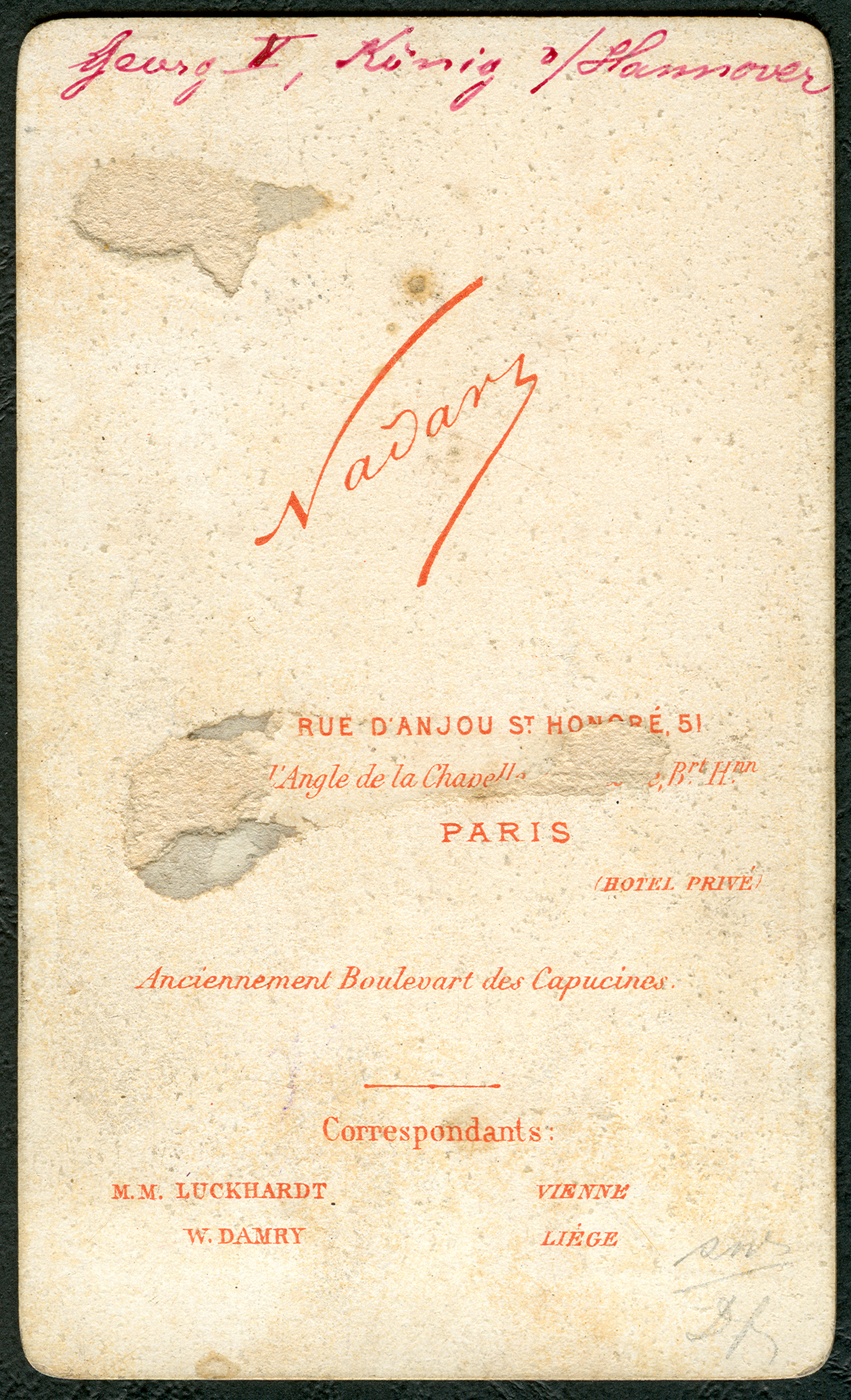 Rückseite oder auch Revers der Carte de Visite aus dem Jahr 1874, handschriftlich wohl später mit roter Tinte beschrieben mit "Georg V, König v / Hannover. Unter dem vorgedruckten Schriftzug des Fotografen Nadar finden sich weitere, auf diesem Dokument nicht mehr vollständig lesbare Angaben: „Rue d'Anjou St. Honoré, 51 / à l' Angle de la Chapelle ... / Paris / (HOTEL PRIVÉ) / Anciennement Boulevart des Capucines. / Correspondants: / M.M. Luckhardt Vienne / W. Damry Liège“ Rechts unten finden sich weitere, bisher nicht entschlüsselte Angaben mit Bleistift ...